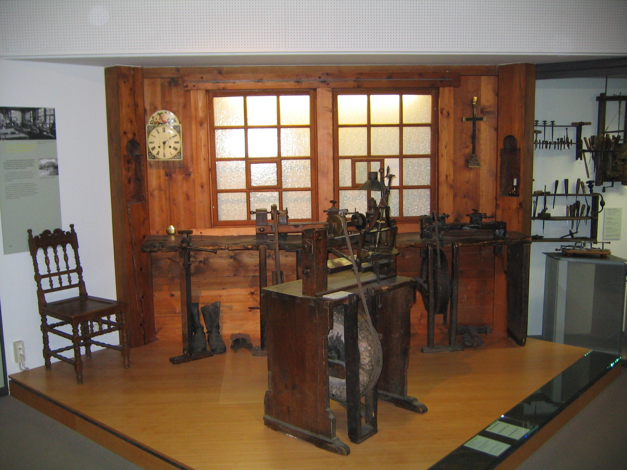 Teile der Uhrmacherwerkstatt des Benedikt Faller vom Gaisdobel in Gütenbach aus der Mitte des 19. Jahrhunderts